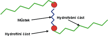 Spojení hydrofilní části molekul můstkem